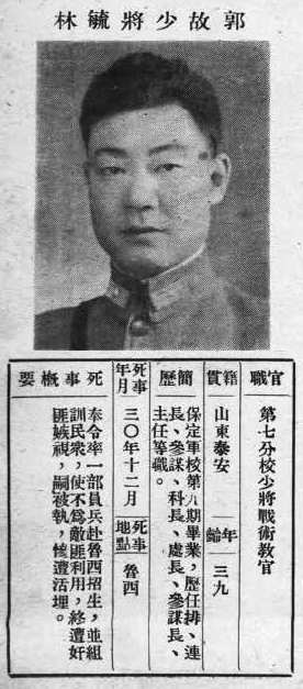 抗戰軍人忠烈錄第一輯中的烈士遺像